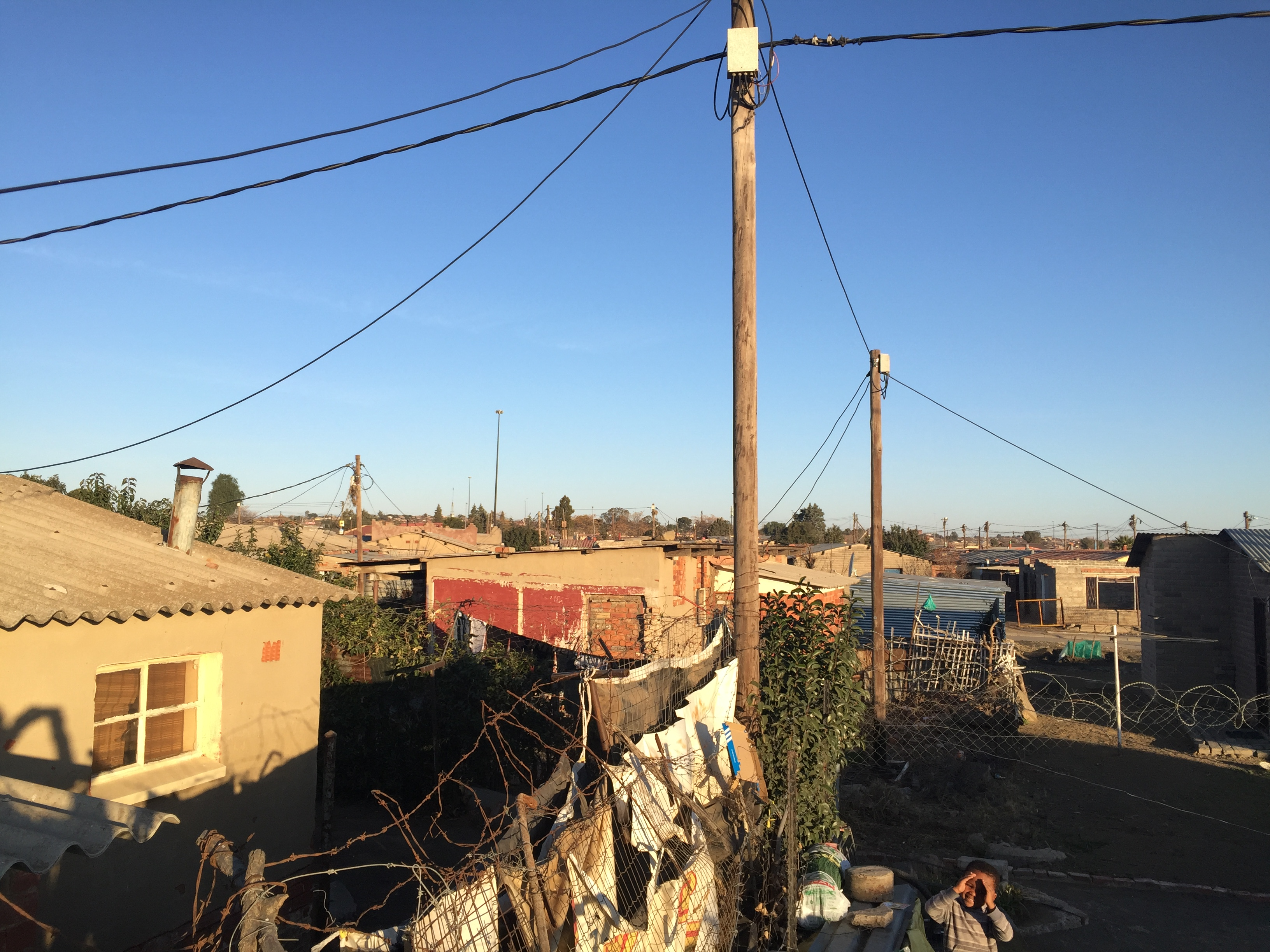 Phahameng, Mangaung, 9323, South Africa